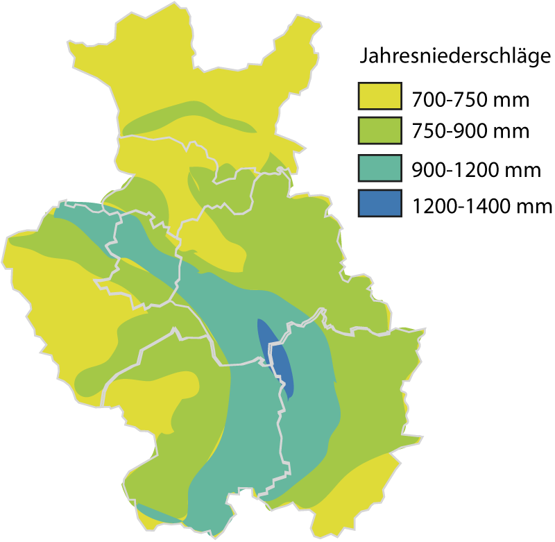 Map of decipitation in Ostwestfalen-Lippe